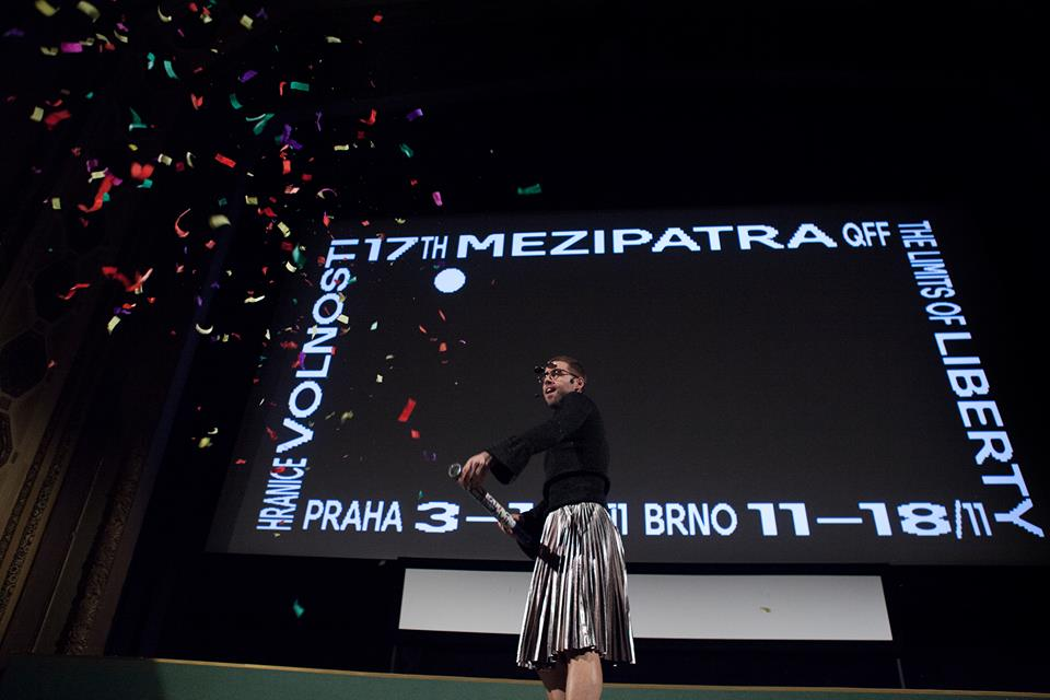 Slavnostní zahájení 17. ročníku Mezipater v pražském kině Lucerna